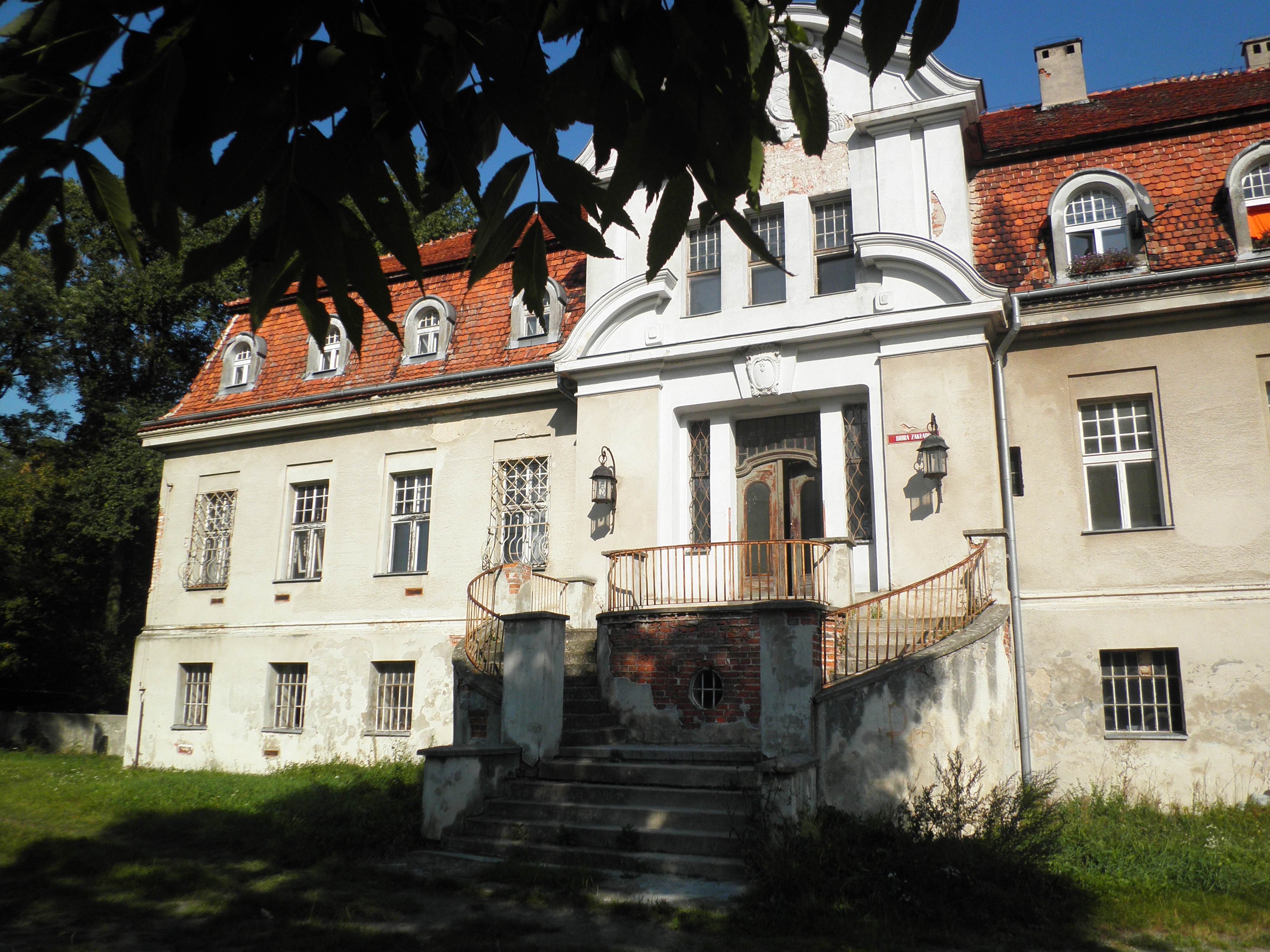 Pałac we Wronowie